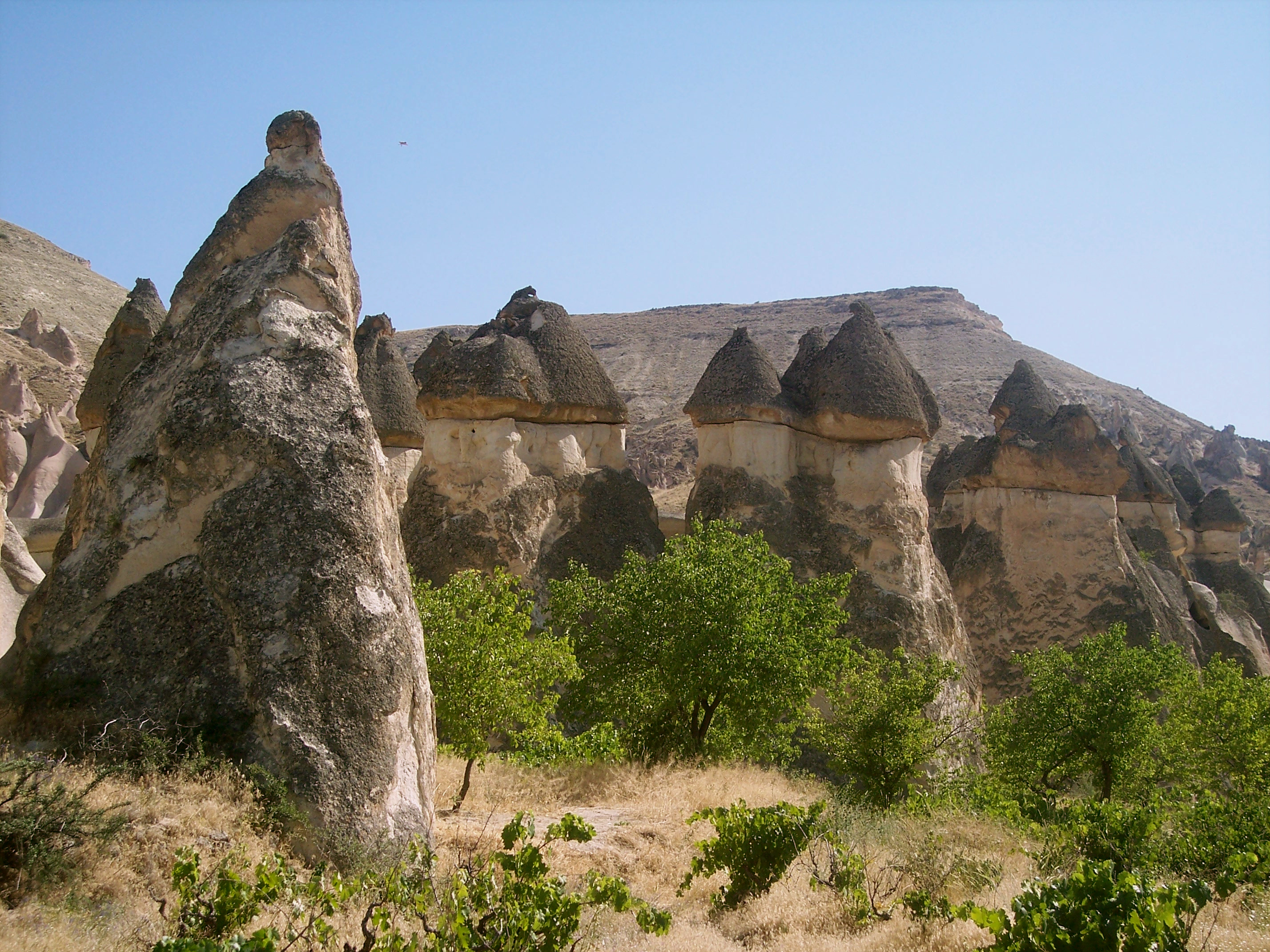 Paşabağı, formerly known as Keşişler Vadisi ("Monks' Valley"), Cappadocia, Nevşehir/Turkey.